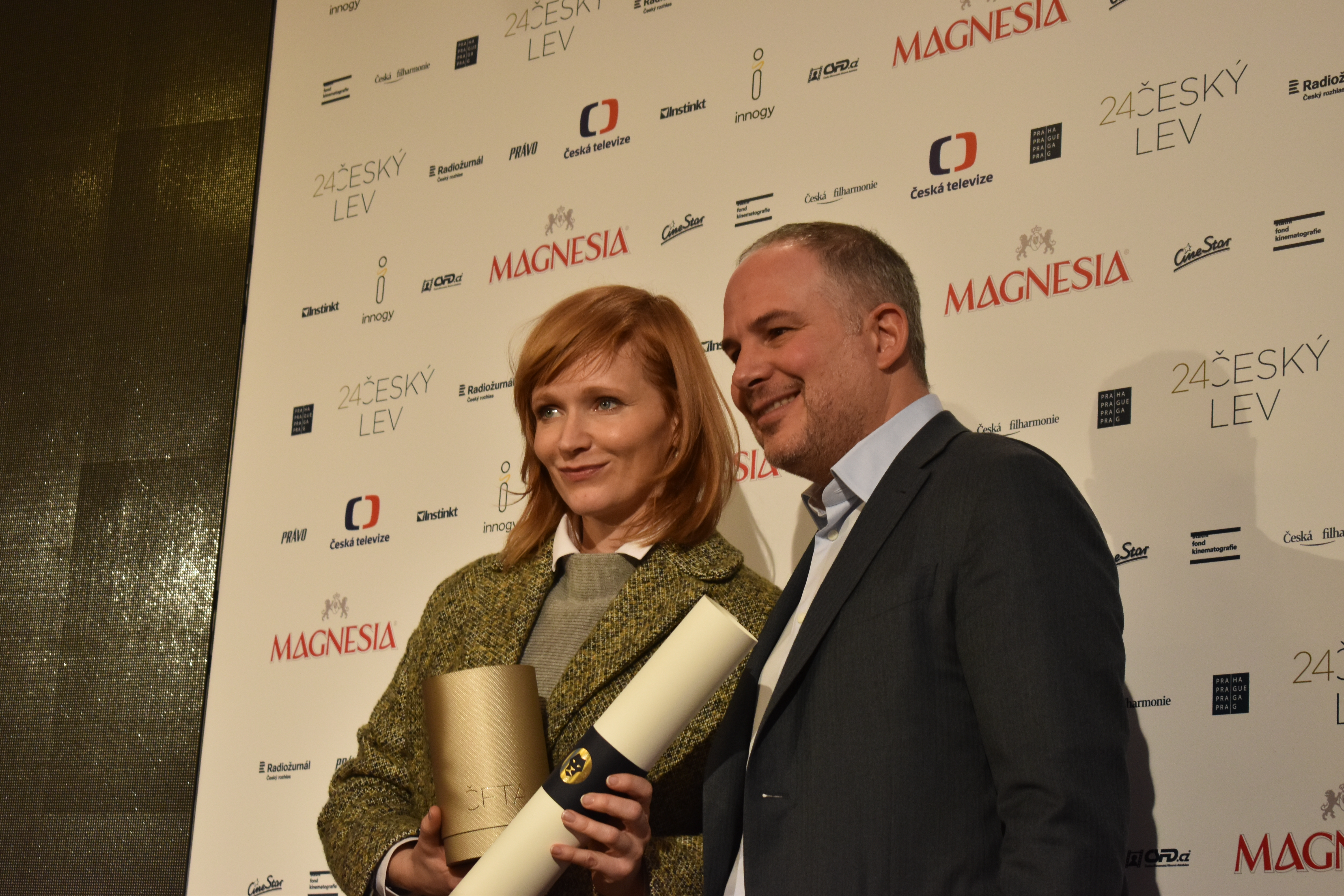 Fotka z novinářské konference 18.1.2017. Autor: Blanka Borová (Karolína Černá) pro Kritiky.cz